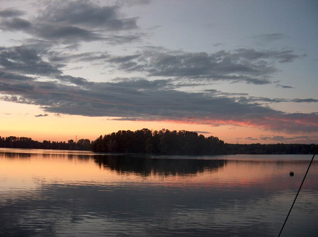 Wyspa na j. Dzierżno Małe o zachodzie słońca